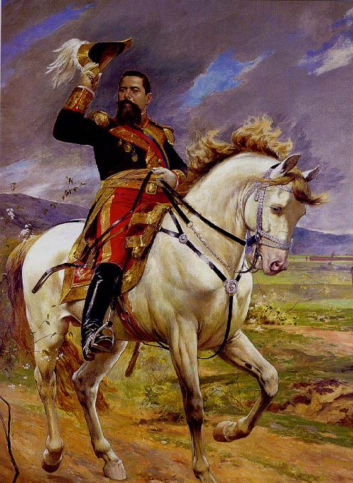 Equestrian portrait of General Joaquin Crespo